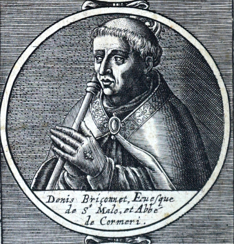 image du livre de Guy Bretonneau.